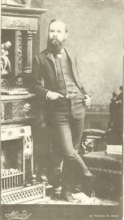 Benjamin R. Tucker (age 33), in Boston